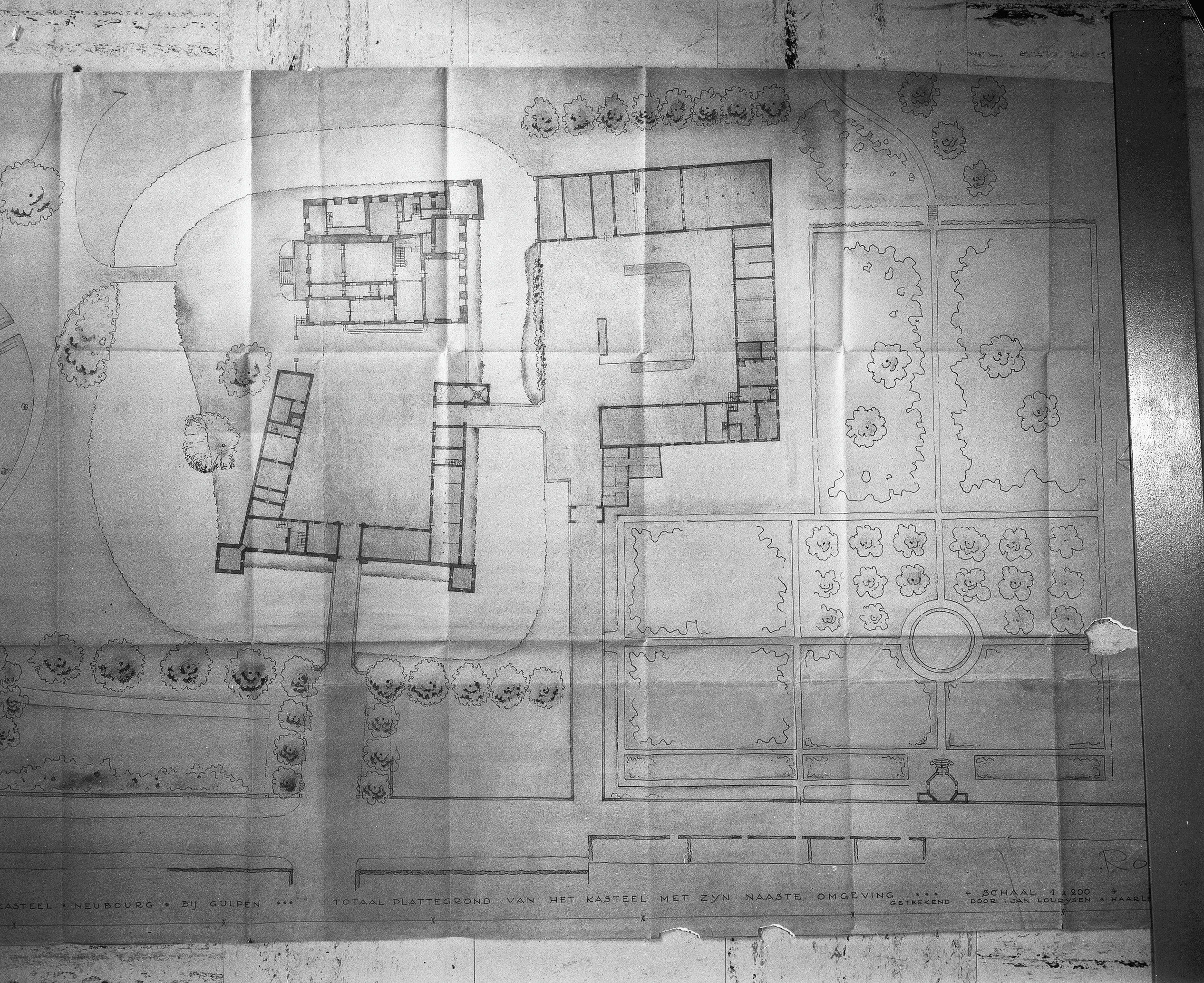 Kasteel Neubourg: plattegrond